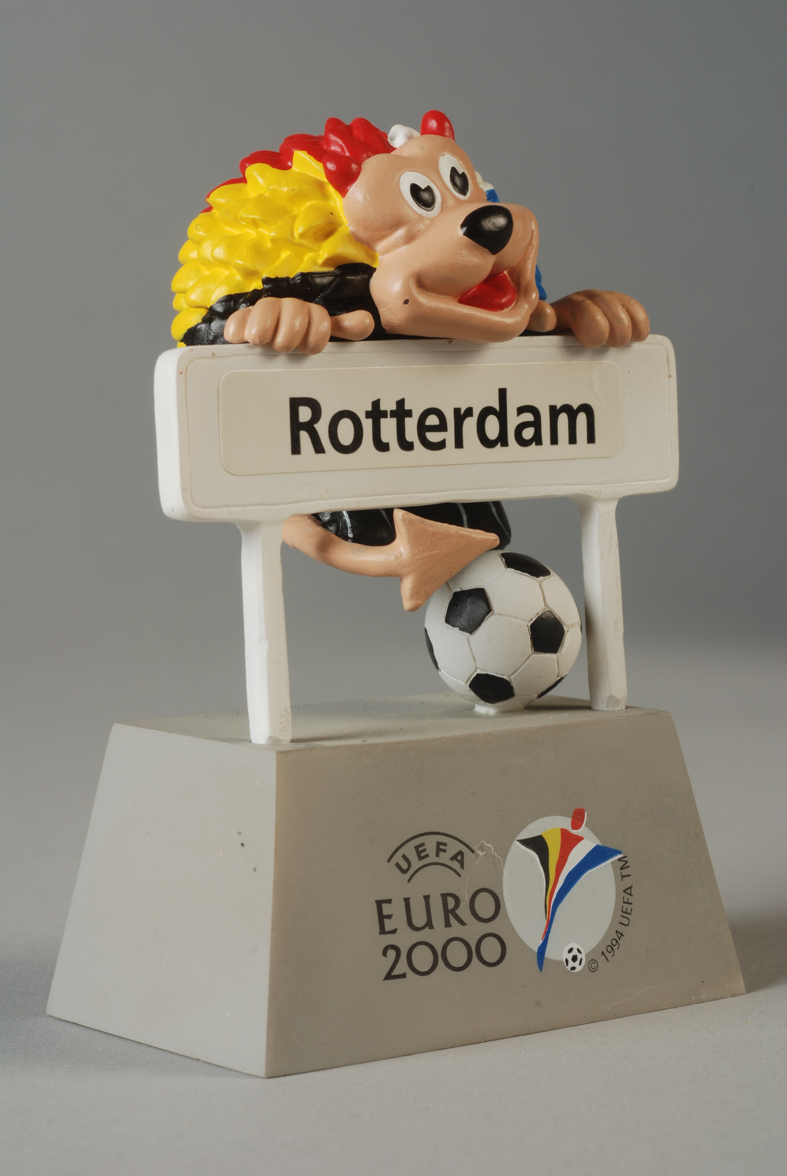 Objectgegevens Titel: Officiële mascotte van Euro 2000, leeuw achter plaatsnaambord Rotterdam, tweedelig, leeuw hangt los aan het bord Beschrijving: Officiële mascottes van Euro 2000: een leeuw met manen in de kleuren zwart-geel-rood-wit-blauw, die de vlaggen van de organiserende landen (België en Nederland) symboliseren. De mascotte (A) wordt gehangen aan een standaard met een voetbal en het plaatsnaambord van Rotterdam (B), de finalestad van het EK2000. Op de standaard is het officiële logo van Euro 2000 afgebeeld. Trefwoorden: mascotte, Opschrift / merk: Voorzijde: "Rotterdam", "UEFA / EURO / 2000". Onderzijde: "Official Licensed Product" etc. Datering: 2000 Materiaal: kunststof, verf Afmetingen: (cm) a: hg 5,0 / br 4,0 / dp 4,5 / b: hg 7,2 / br 6,3 / dp 4,1 Associatie: Rotterdam, voetbal, Euro 2000, EK2000, Europees Kampioenschap, fan, persoonlijk attribuut, promoten Vorm & decoratie: logo, beeldmerk, beeld, leeuw, dier Inventarisnr: Museum Rotterdam 78426-A-B